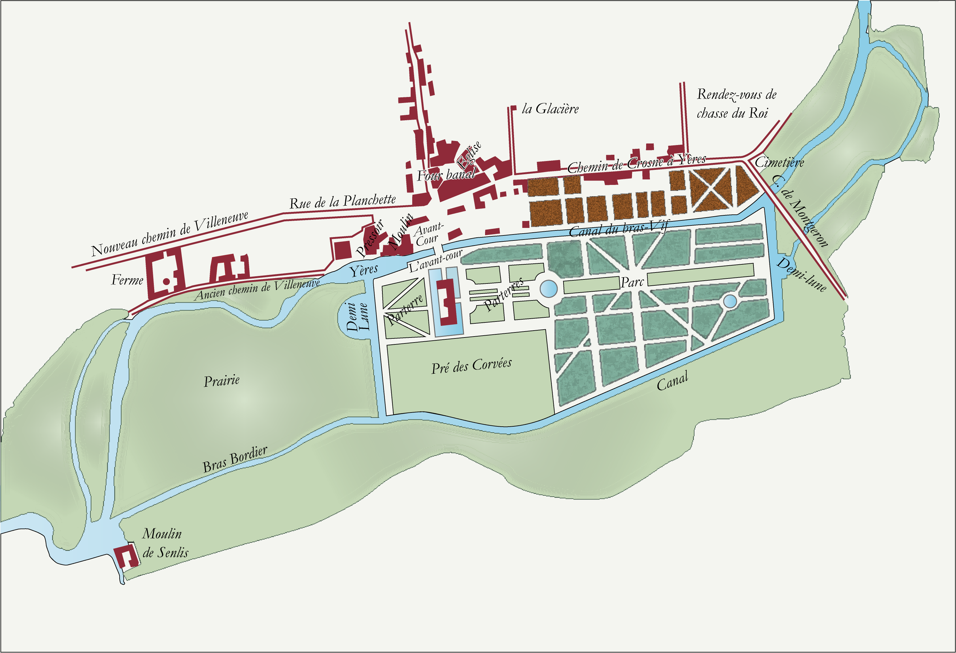 Crosne - Plan seigneurial dressé en 1766